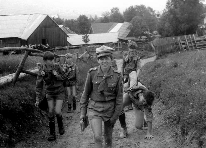 Wołomin